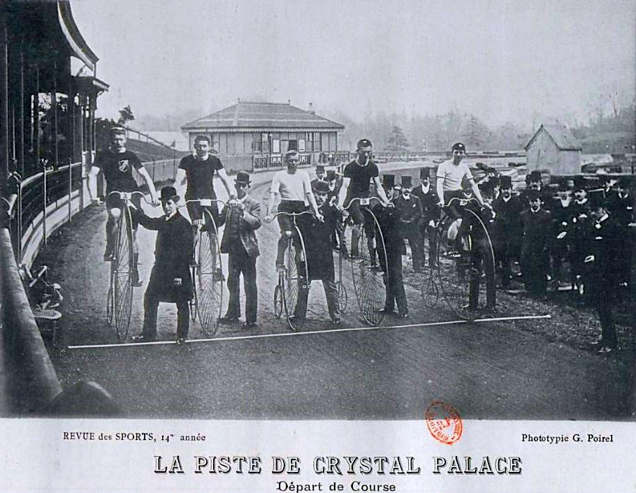 Course de grand-bi à Crystal Palace en mars 1889.